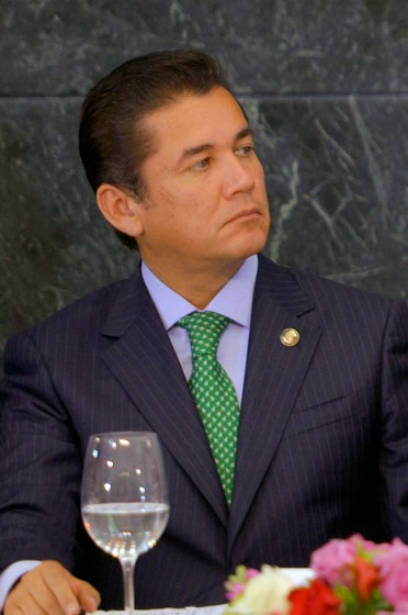 Carlos Alberto Puente Salas, senador de México de 2012 a 2018